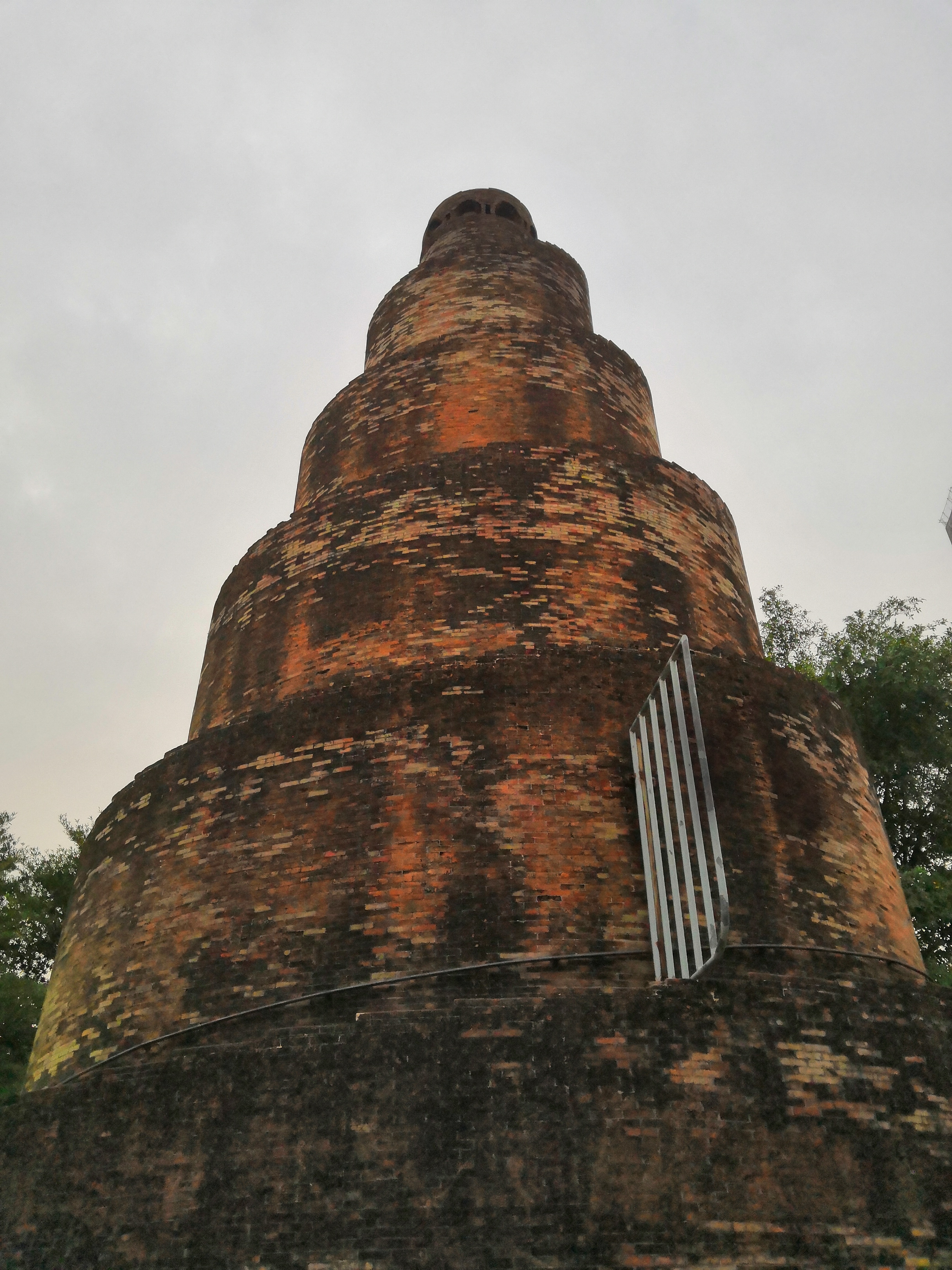 中文（中国大陆）: 深圳 世界之窗